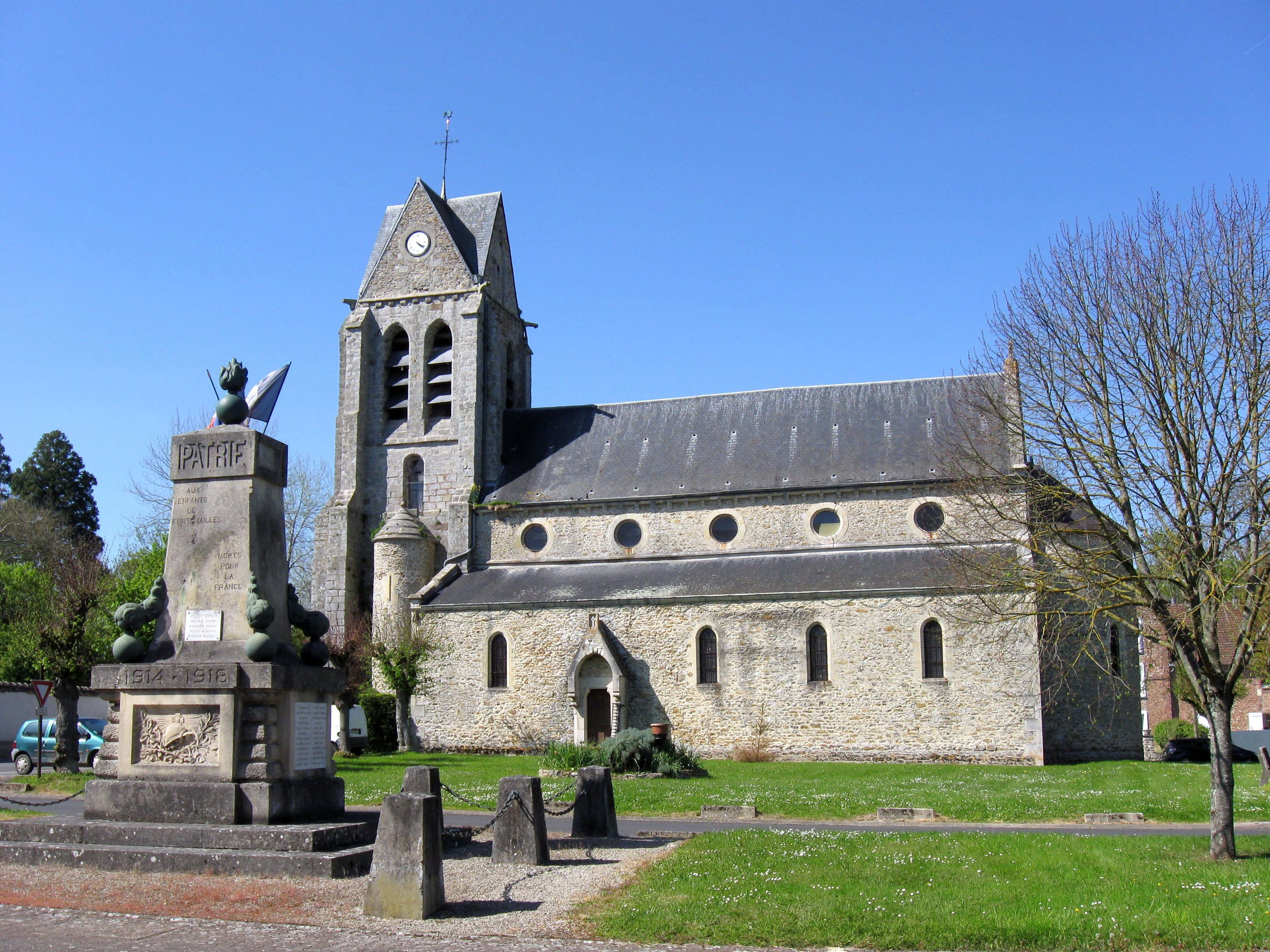 L'église Saint-Fiacre et le monument aux morts de Fontenailles. (Seine-et-Marne, région Île-de-France).